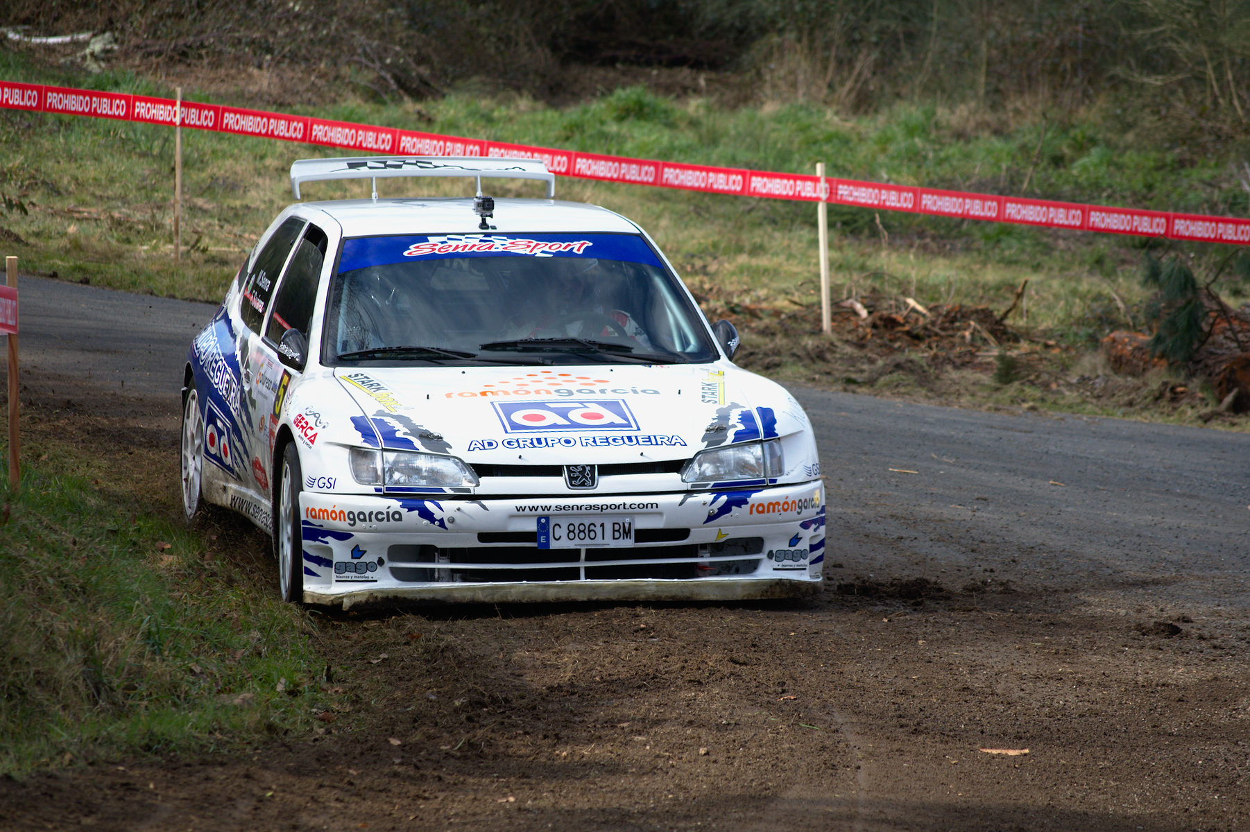 Manuel Senra - Rally de A Coruña 2017